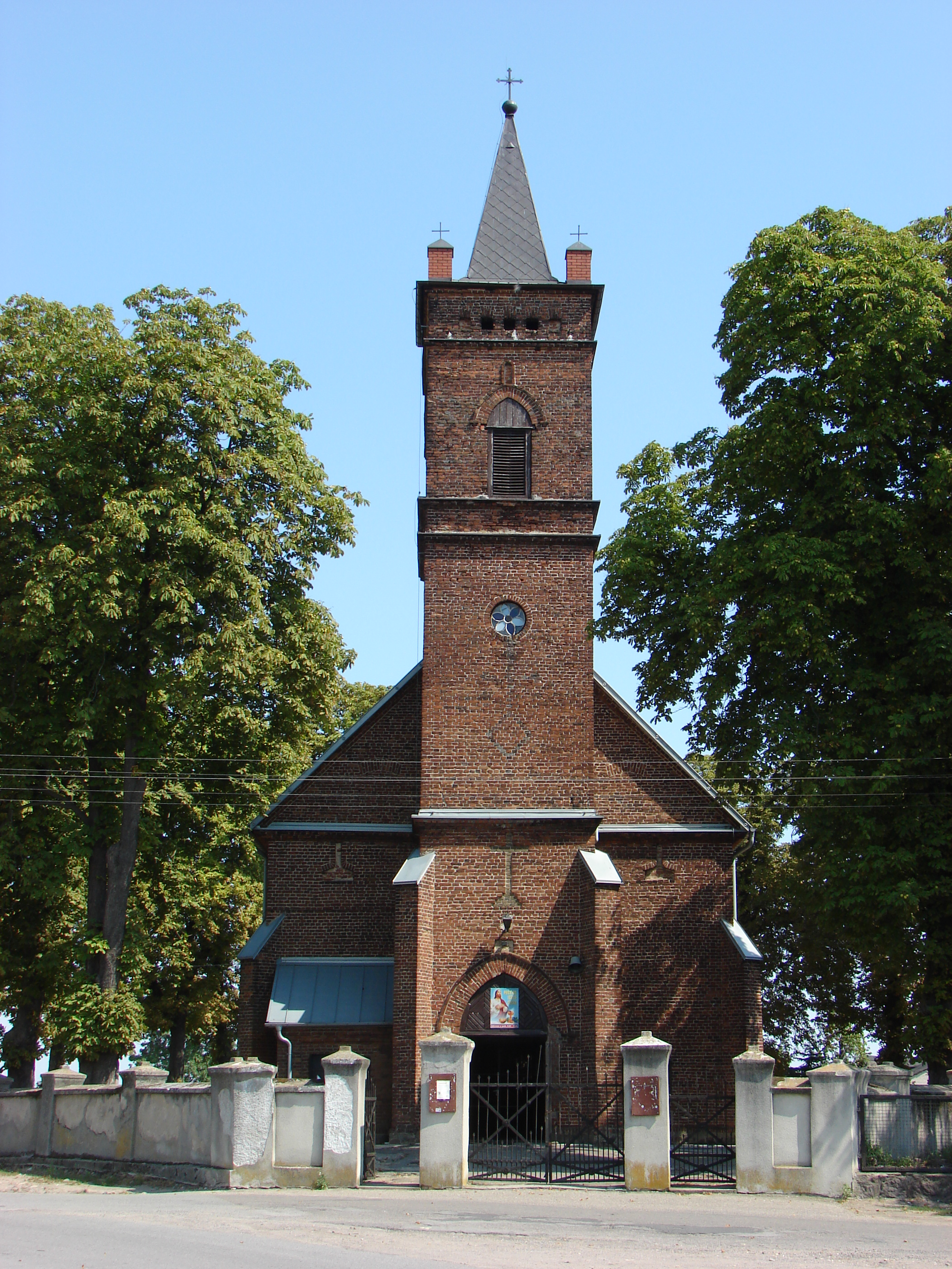 Strzegocin, kościół par. p.w. śś. Bartłomieja i Wojciecha, 1866-1868